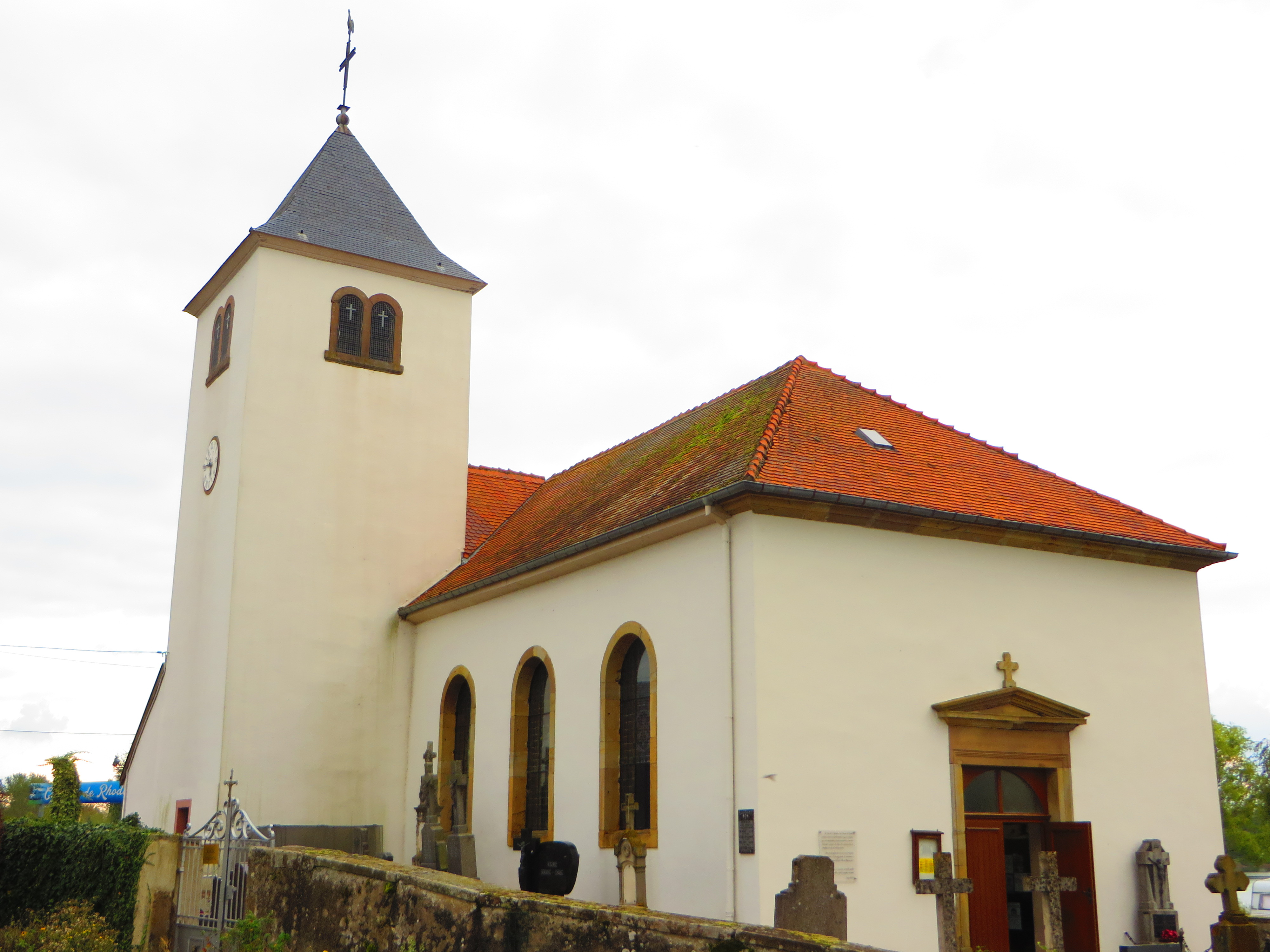 Rhodes Église Notre-Dame